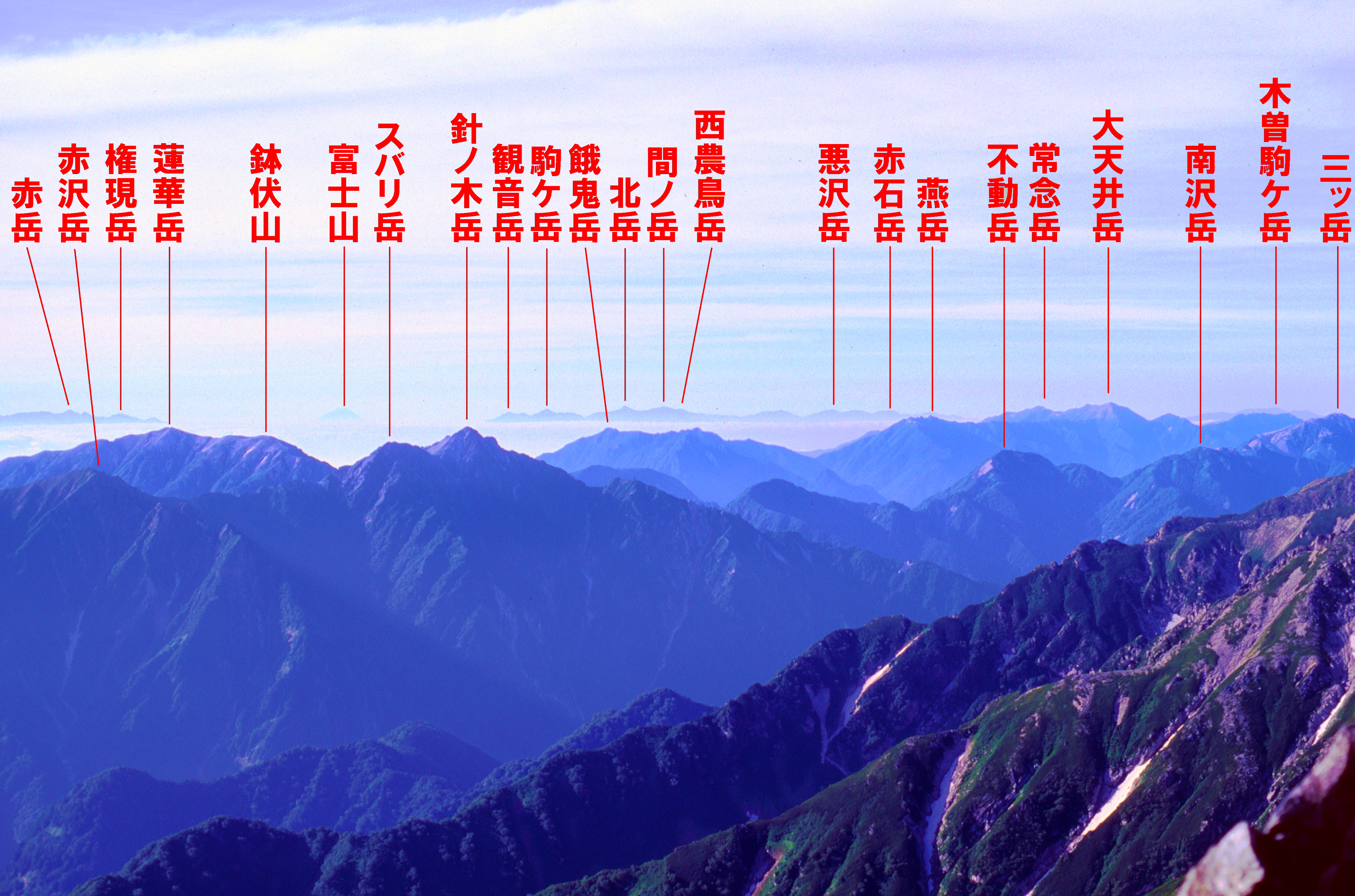 剱岳山頂から見た山々。富士山・南・中央アルプス方面